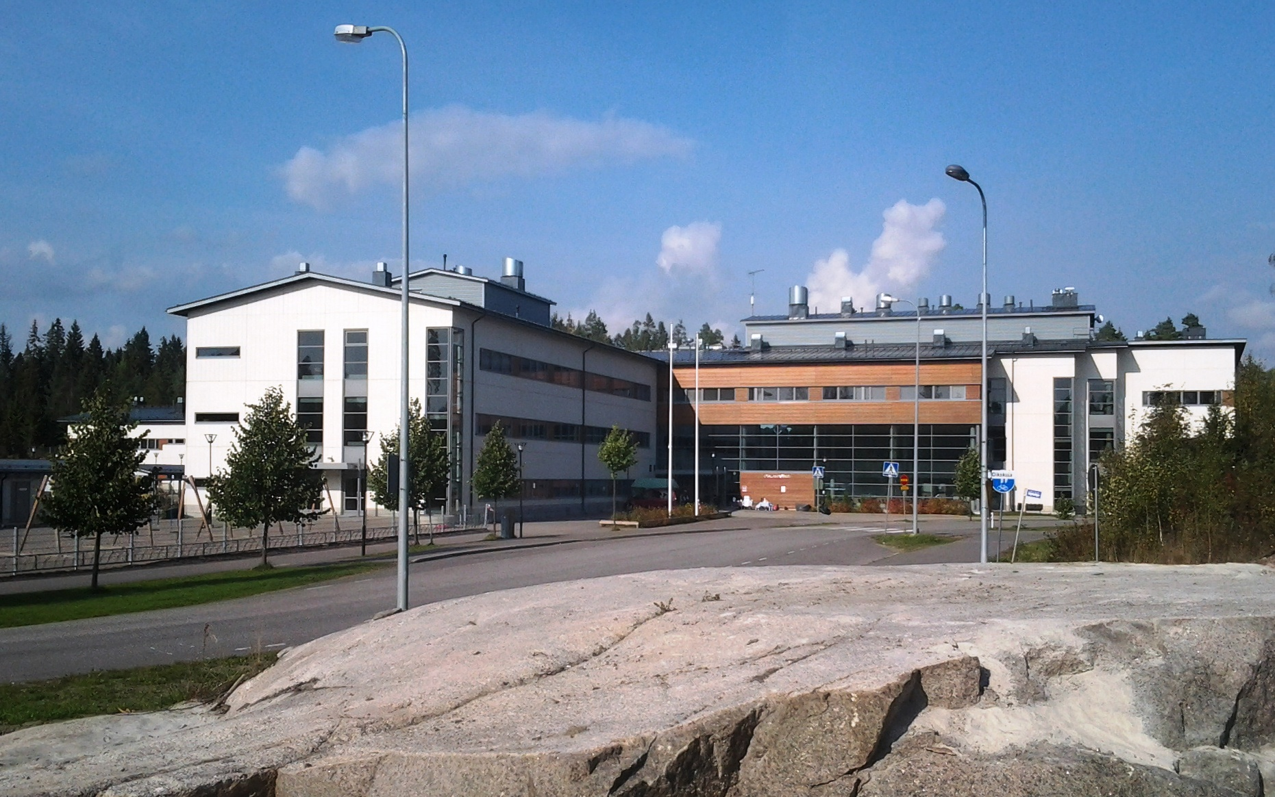 Otalampi-talo Vihdin Otalammella.